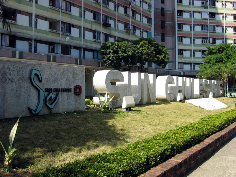 HK Sun Chui Estate Ident